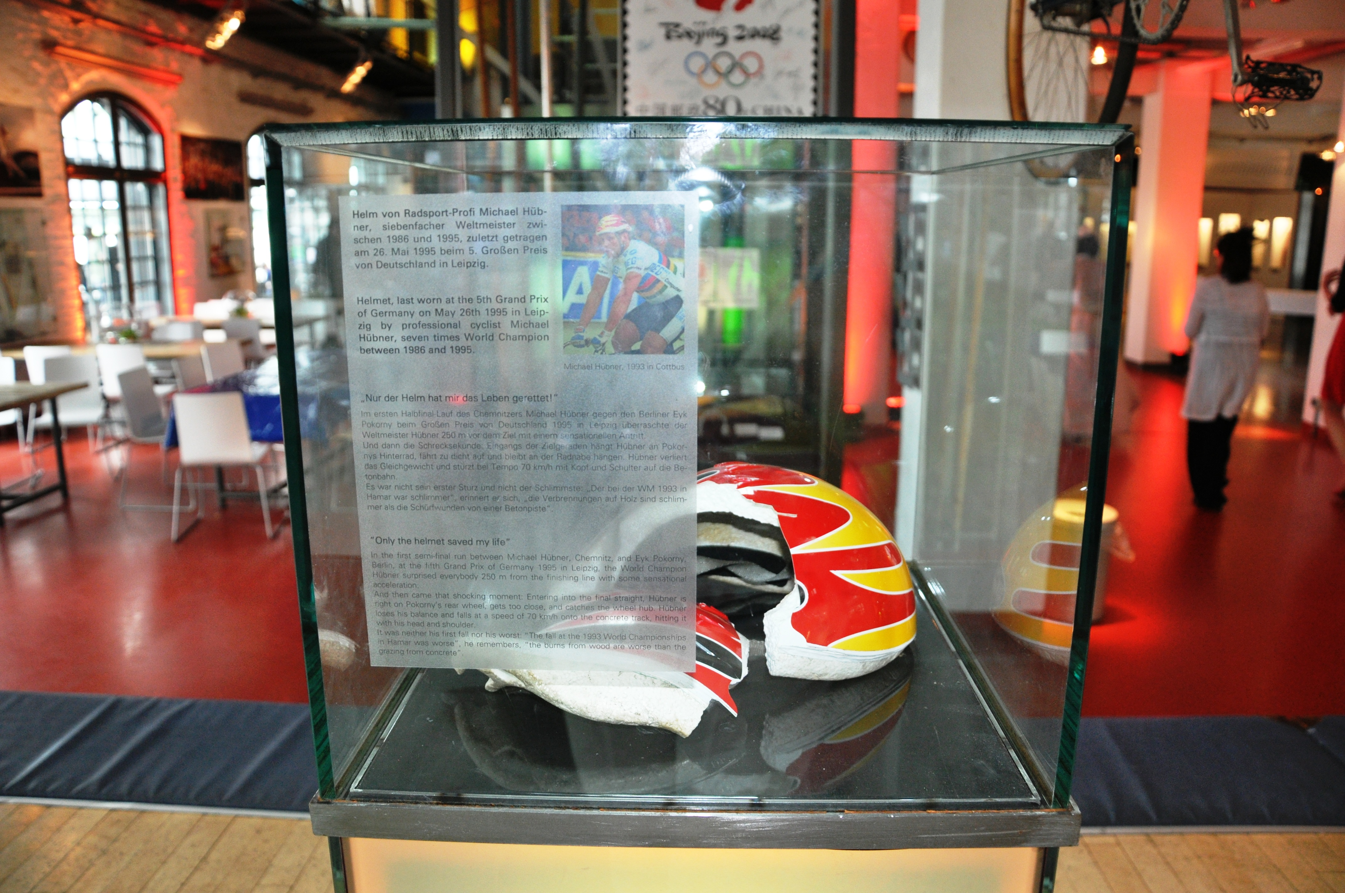 Helm des deutschen Bahnsprinter Michael Hübner im Deutschen Sport- und Olympiamuseum in Köln. Hübner trug diesen Helm beim Großen Preis von Leipzig in einem Rennen gegen Eyk Pokorny. Hübner stürzte und fiel auf den Kopf, der Helm zerbrach. "Nur der Helm hat mir das Leben gerettet."